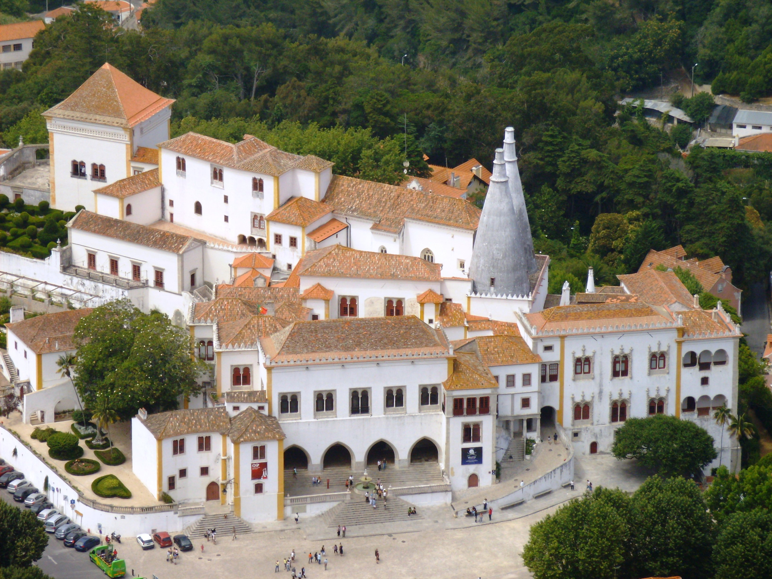 Palácio Nacional de Sintra, Portugal: fachada principal.